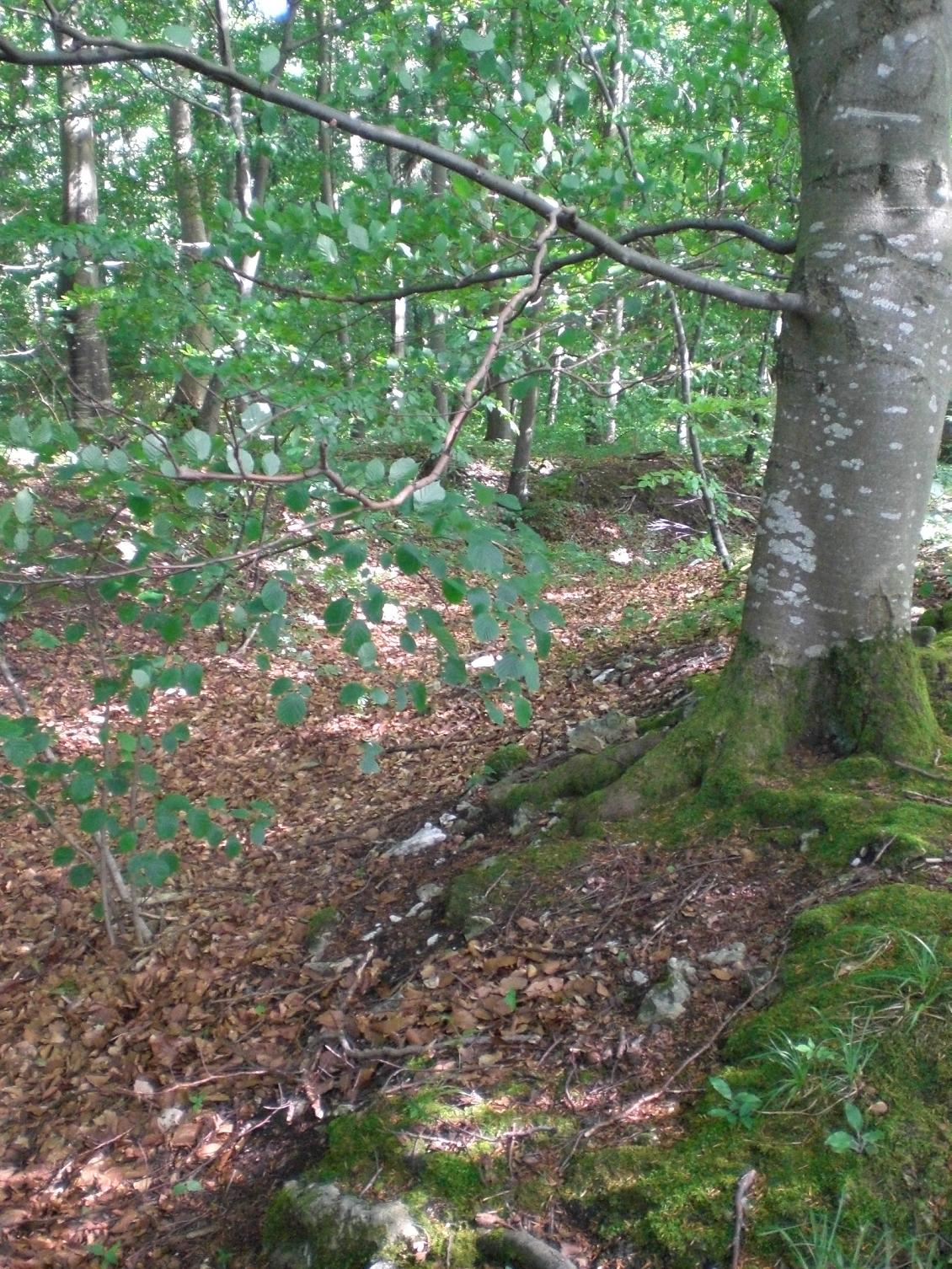 Burggraben der Burgruine Burg Stahleck bei Ohnastetten, Landkreis Reutlingen, Baden-Württemberg